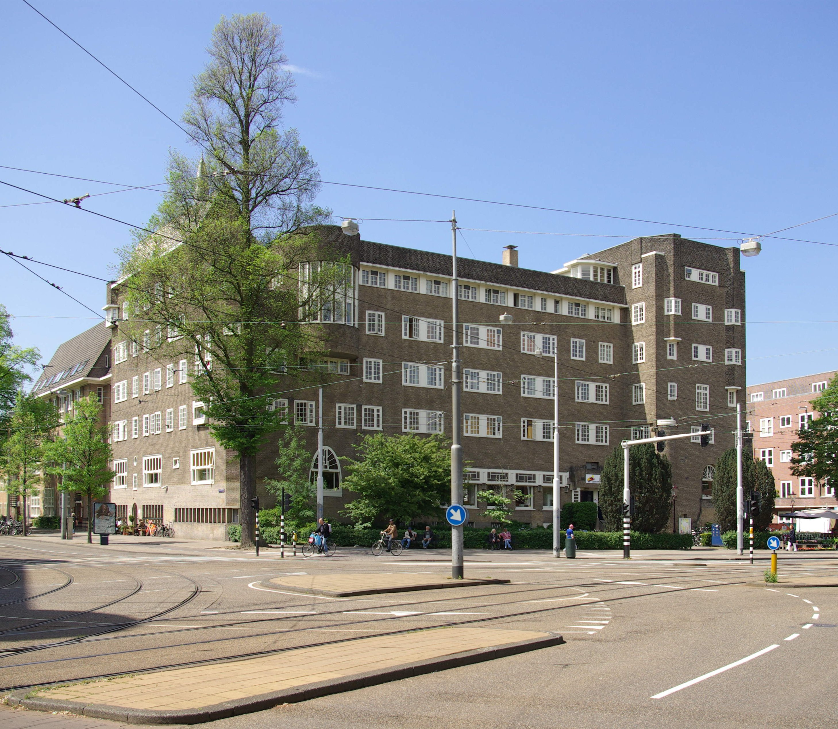 Huize Lydia in Amsterdam 61″ N, 4° 52′ 52.33″ E